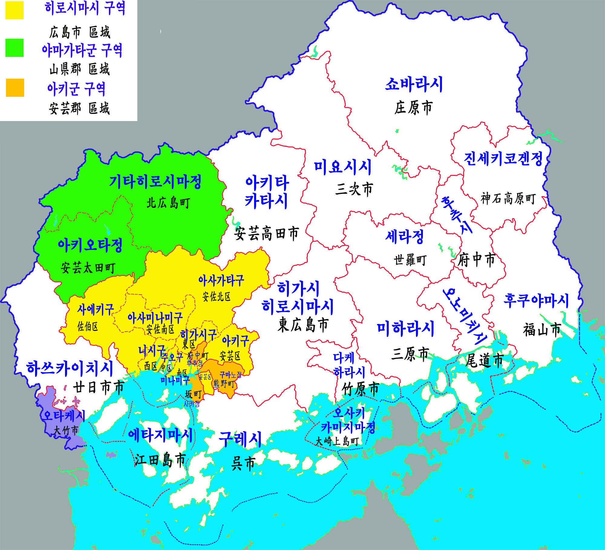 히로시마현 행정구역